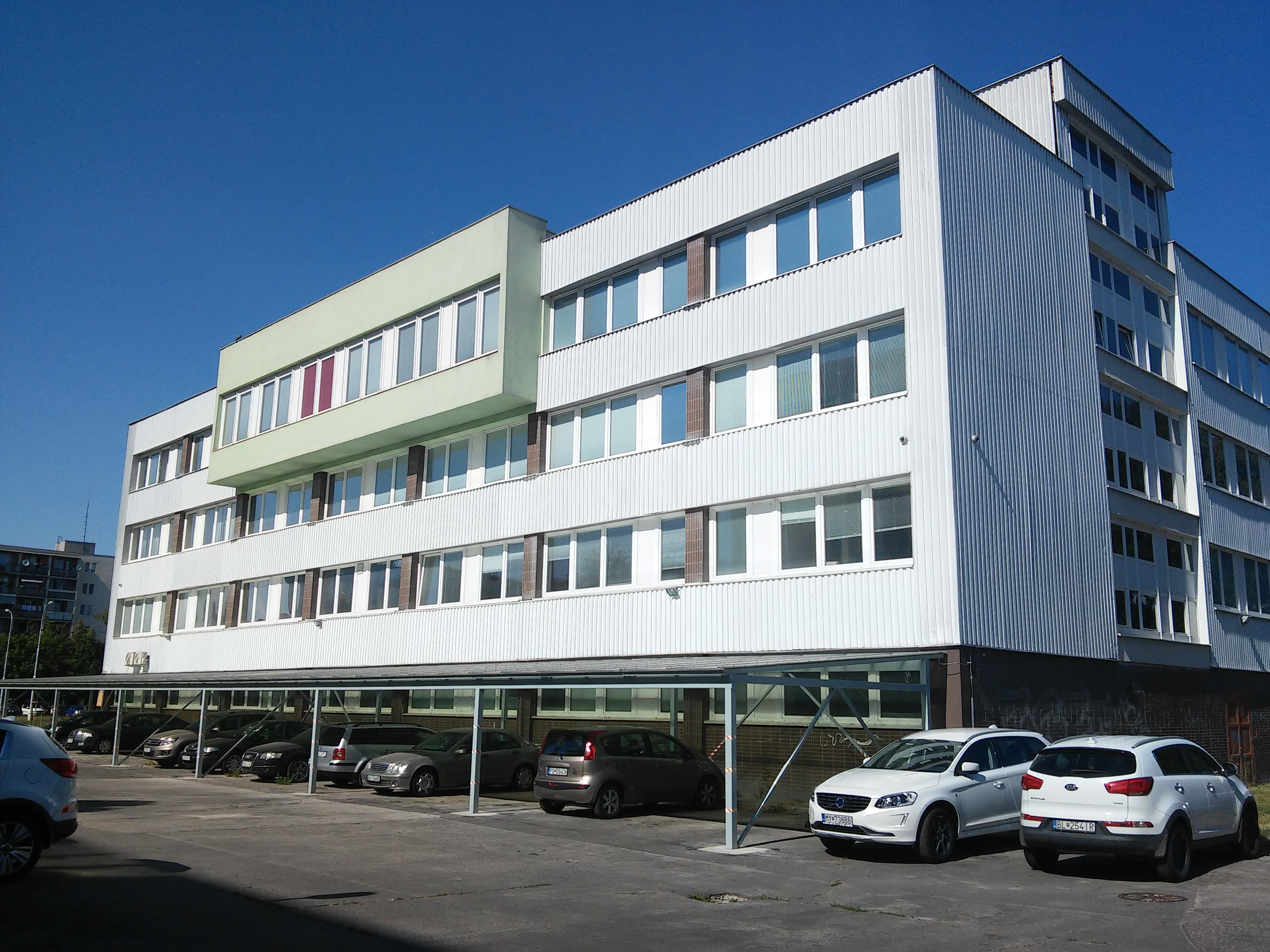 Úrad geodézie, kartografie a katastra Slovenskej republiky, Chlumeckého 4, Ružinov, Bratislava